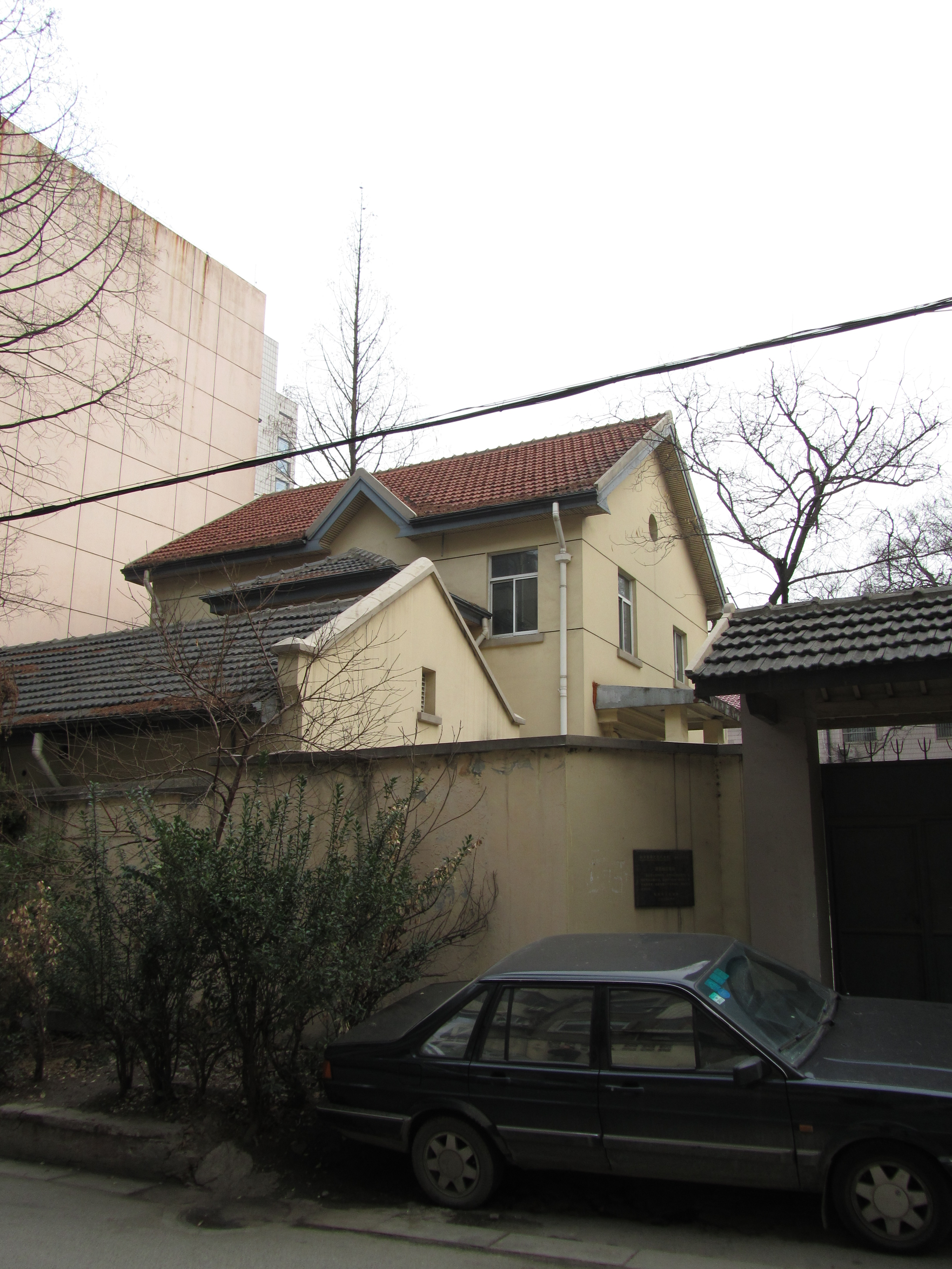 南京傅厚岗吴贻芳故居，建于二十世纪三十年代。